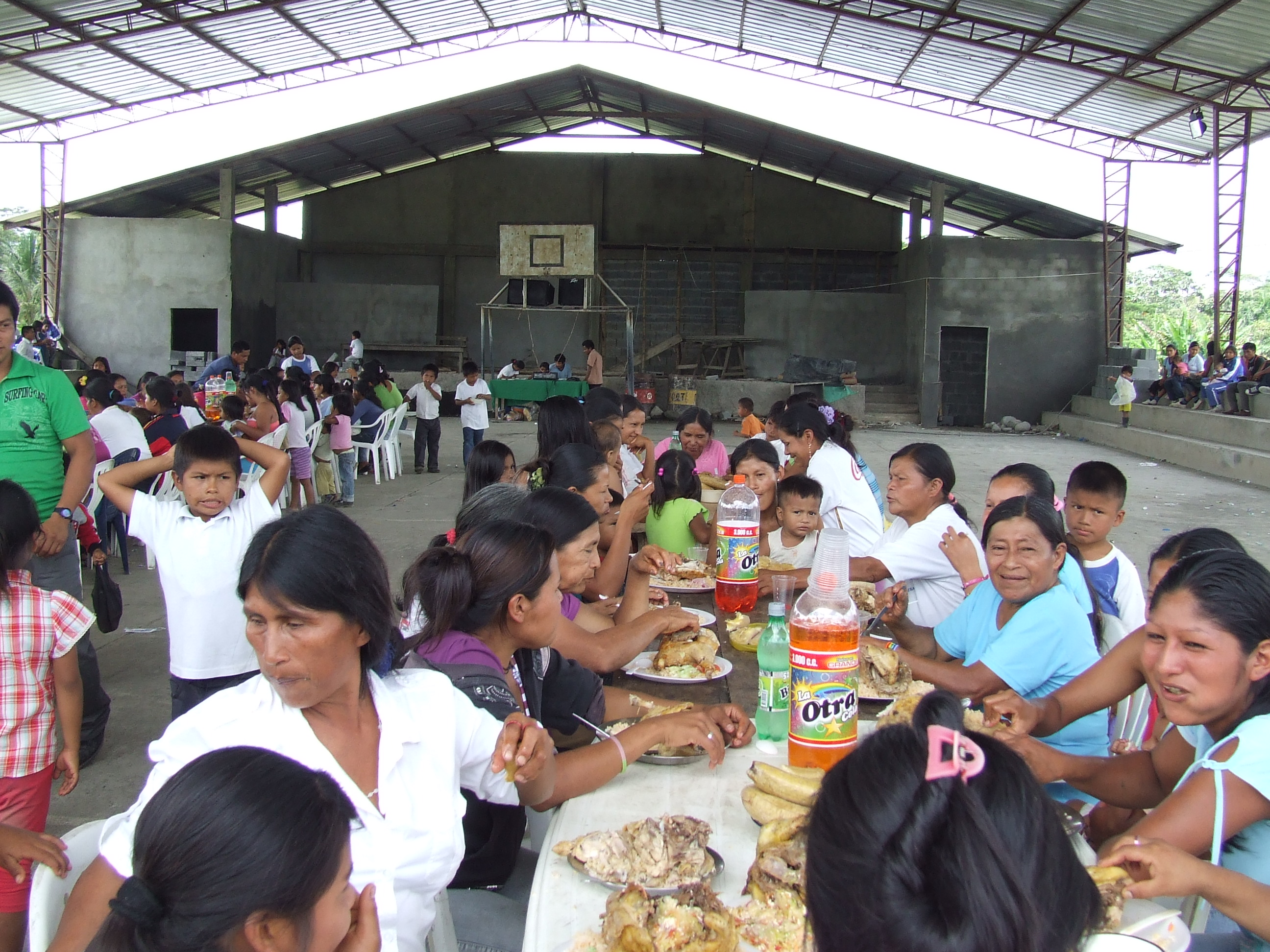 Versammlung einer Communidad der Shuar Indigenen (Ecuador)